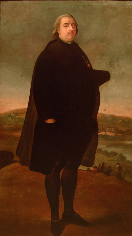 Retrato del aristócrata e ilustrado español Ramón Pignatelli y Moncayo (1734-1793).